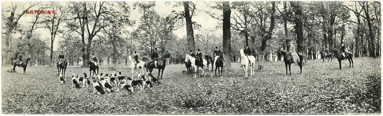 Antoniny na Wołyniu, sfora psów i jeźdźcy podczas polowania par force.